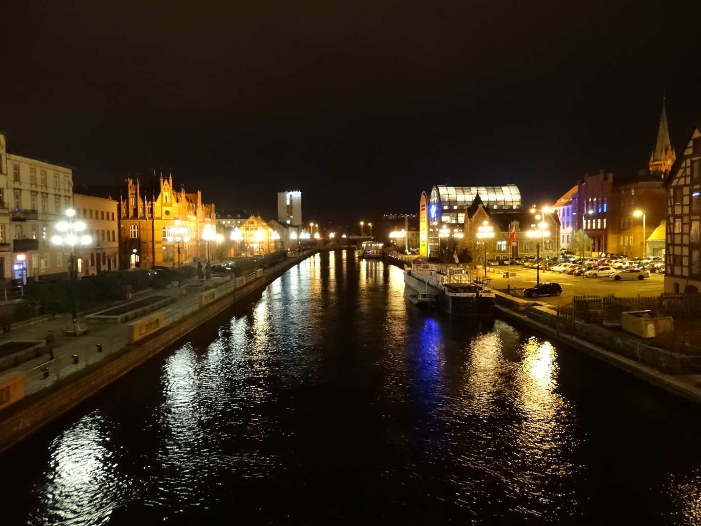 Widok z mostu Staromiejskiego im. Jerzego Sulimy-Kamińskiego w Bydgoszczy